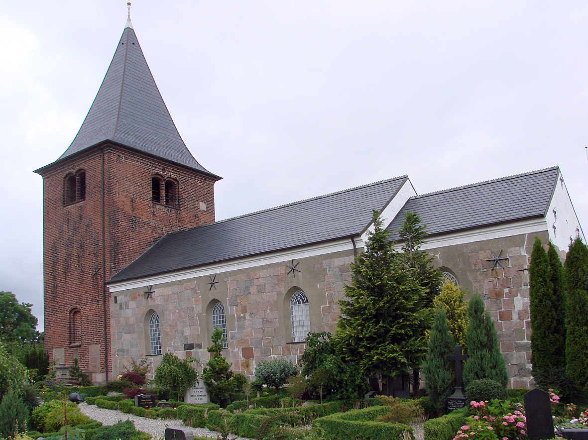 Foldby Kirke ligger i Foldby Sogn, Sabro herred. Århus amt, Århus stift, Østjylland, Denmark. Foldby Kirke